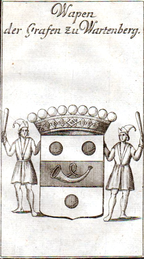 Wappen der Reichsgrafen von Wartenberg (seit 1699) aus dem Hause Kolb von Wartenberg, königlich preußische General-Erbpostmeister (seit 1702; dafür das goldene Jagdhorn (Posthorn) als „Wappenbesserung“)